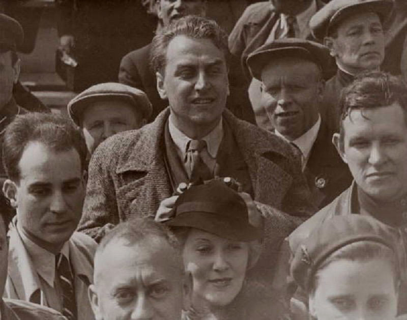 Орлова и Александров впервые у трибуны мавзолея Ленина